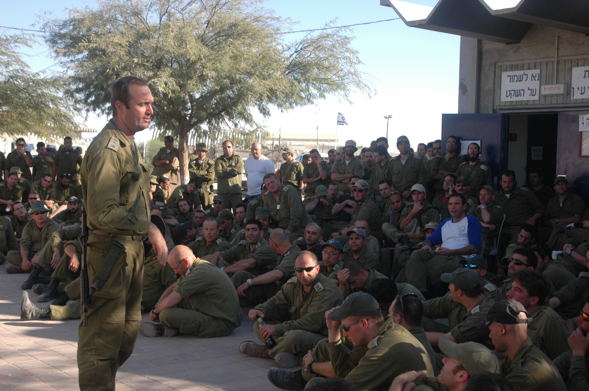 שיחת מח"ט 130 אל"מ רענן ברנר לפני יציאה לאימון